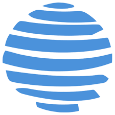 Logo Mladých diplomatů, z.s.